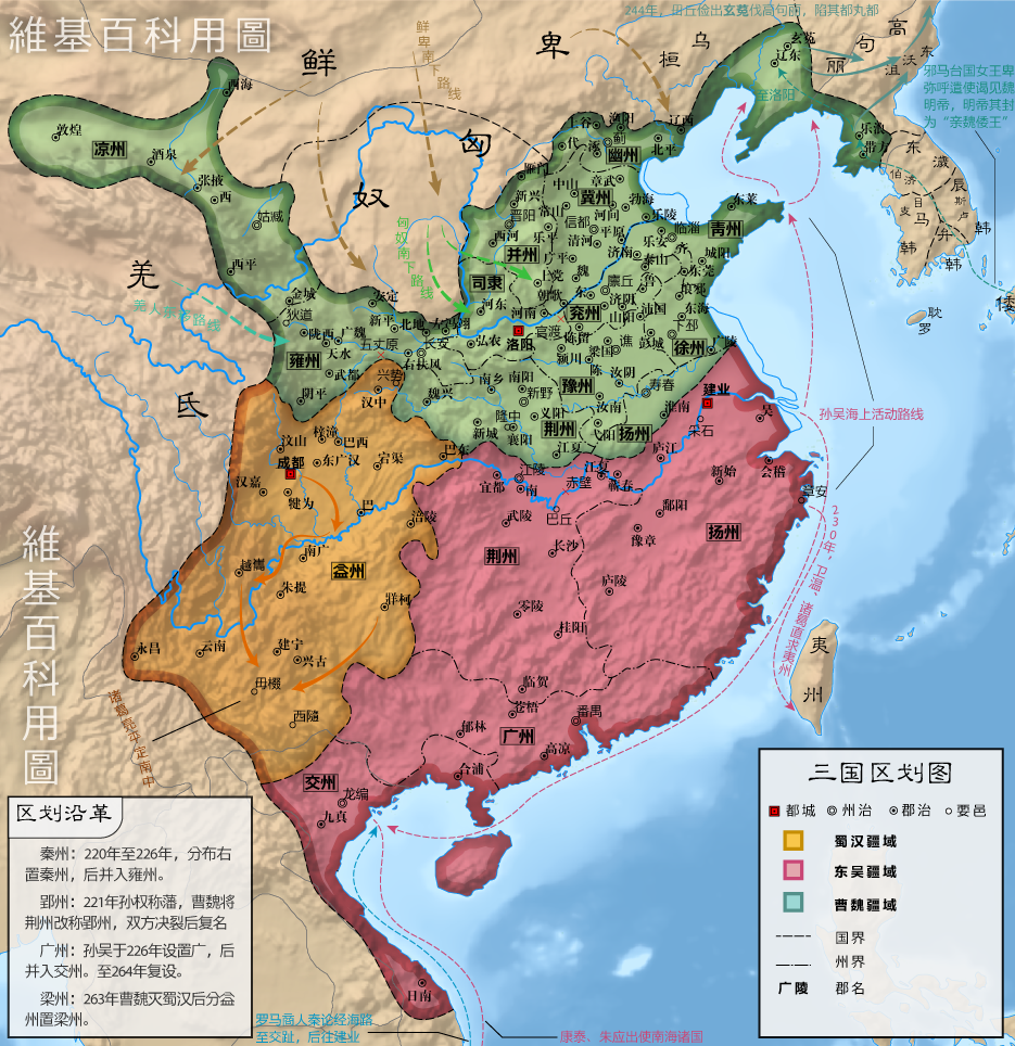 三国